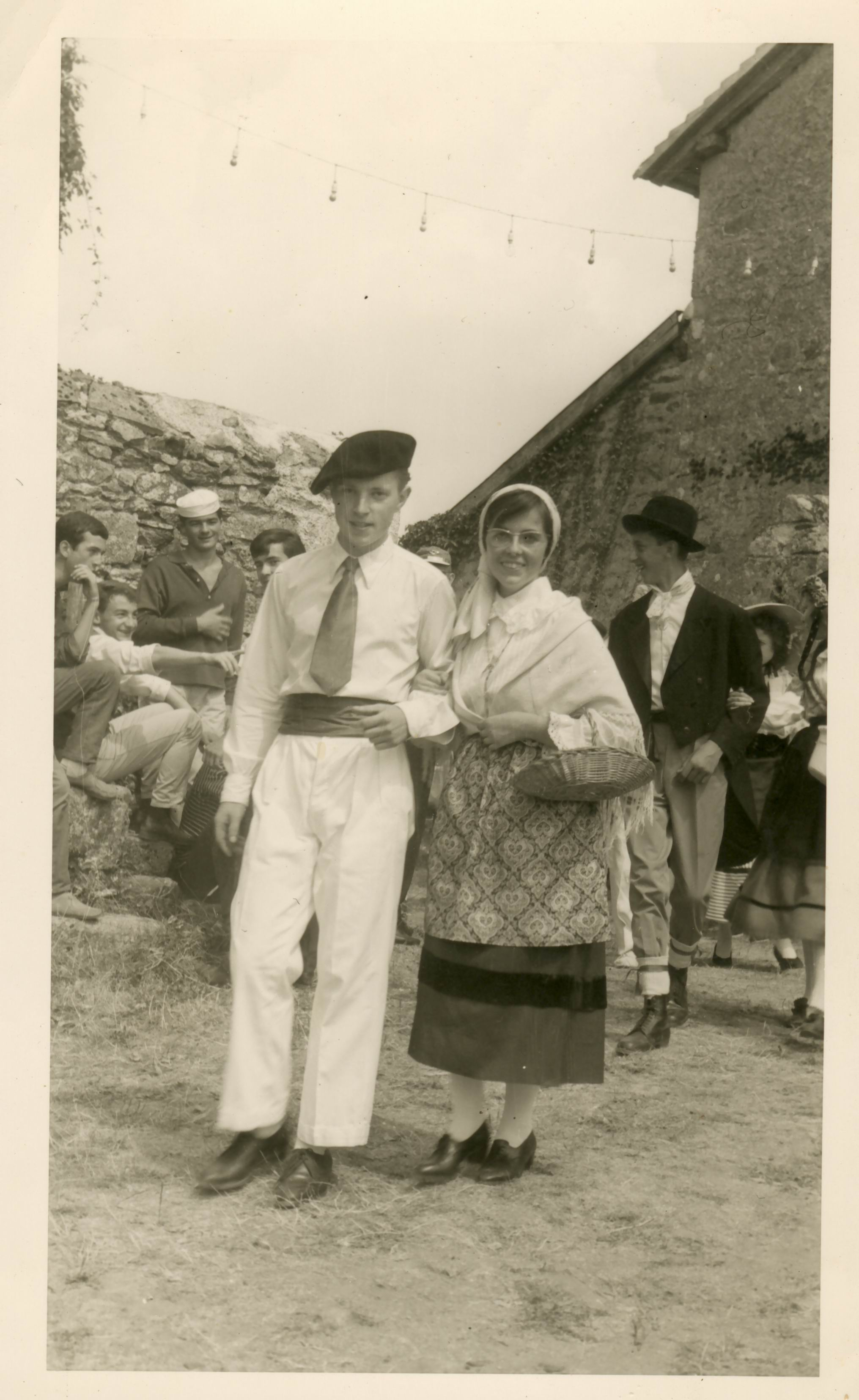 Pierre Desproges (2ème personne sur la gauche) se moquant de son frère Jacques (1ère personne sur la droite) lors de la kermesse au château de Châlus Chabrol le 26 septembre 1958. Au premier rang, Chantal Moratti, née Moins et un cavalier non identifié